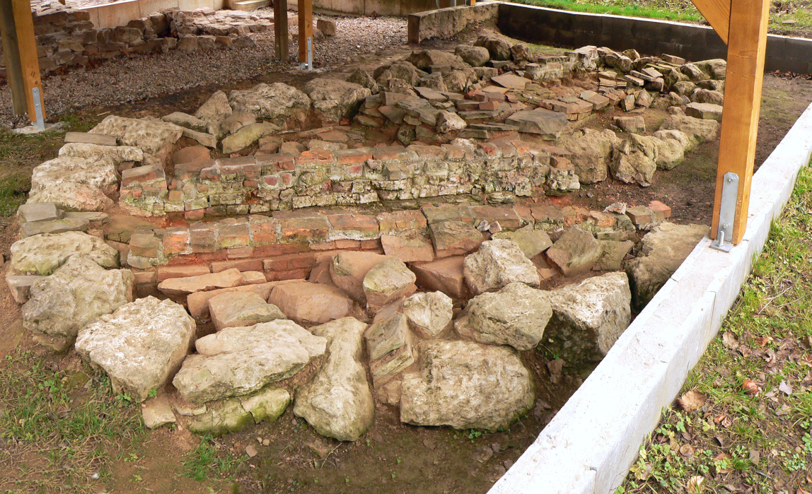 Glasmanufaktur Holzen, Nebenofen